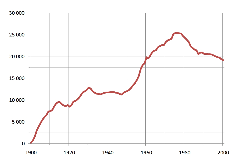 Diagram över befolkningsutvecklingen i Kiruna centralort åren 1900–2000. Från och med 1974 ingår även Tuolluvaara i siffrorna.